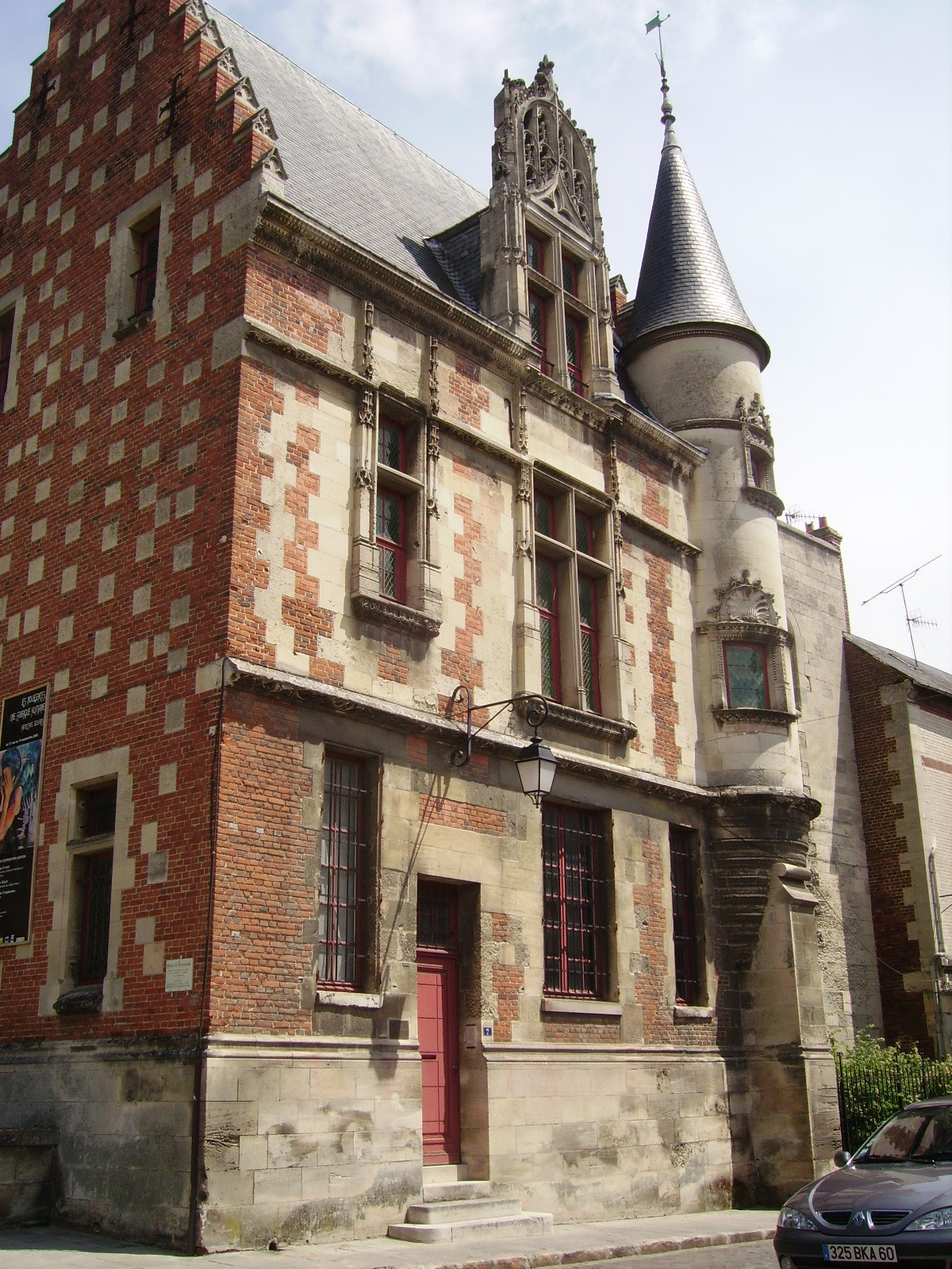 Palais Episcopal à Noyon